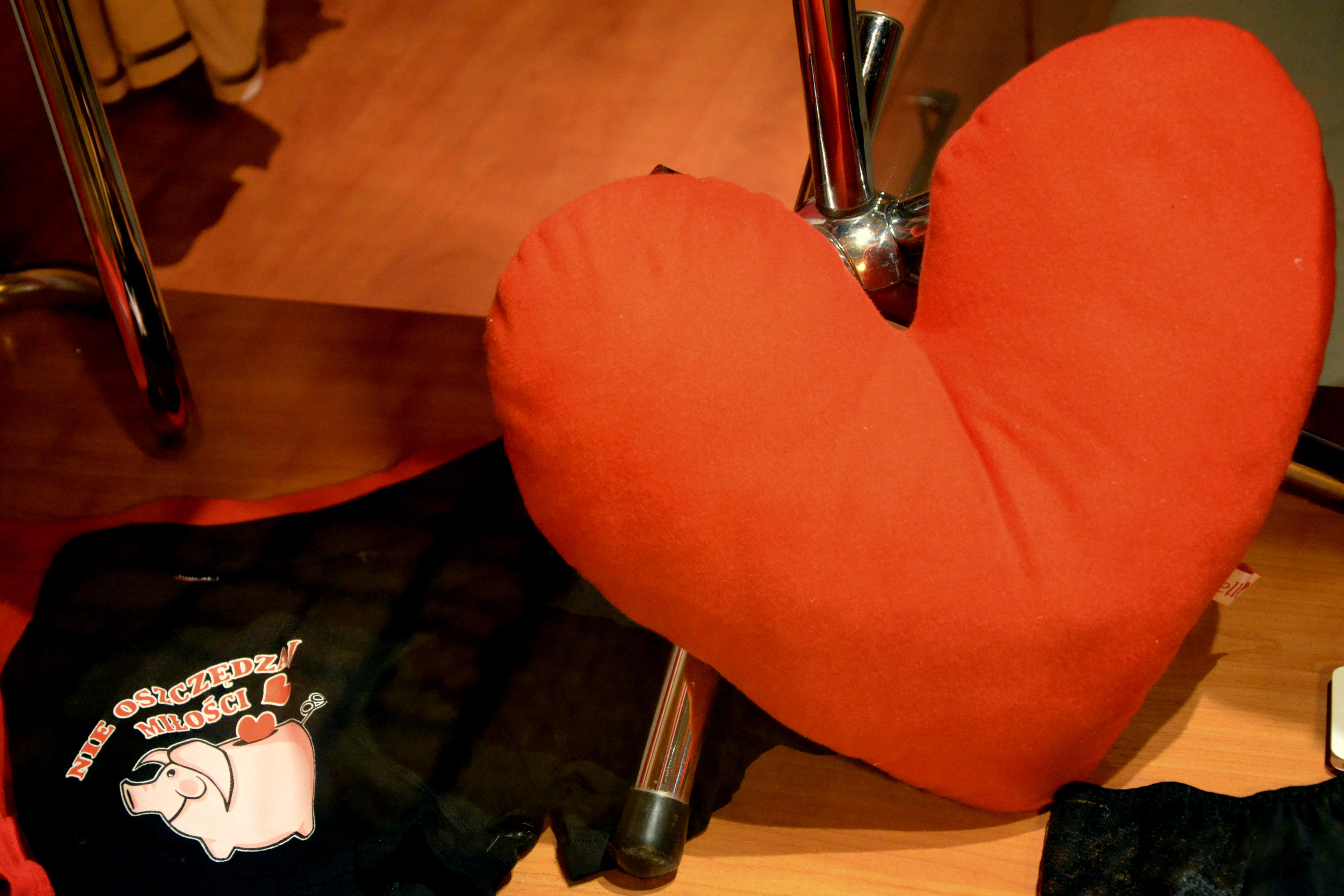 Valentinstagsdekoration eines Schaufensters in Sanok